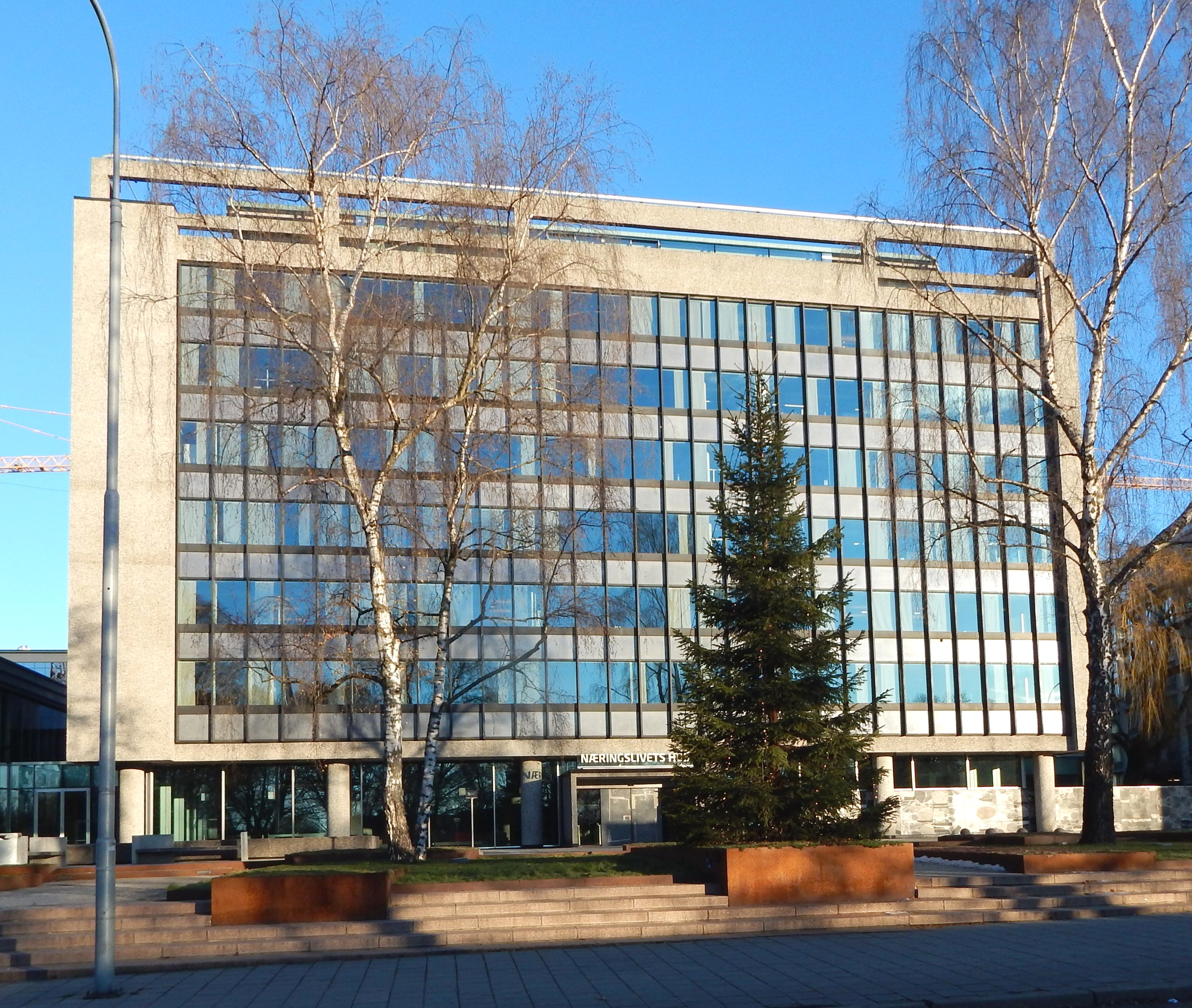 Næringslivets hus i Middelthuns gate 27 i Oslo